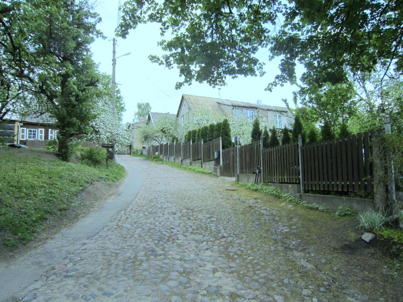 Žvirgzdyno gatvė 2011 m.